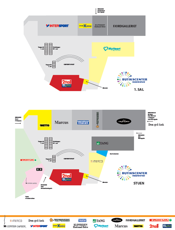 Oversigtsplan over Hadsund Butikscenter. Planen er i praksis lavet af Hadsund Folkeblad og Nordjyske, med bestilling af Jan Vstergaard.